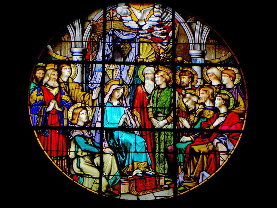 La Pentecôte. Vitrail de l'église Saint-Pierre de La Selle-en-Coglès (35).